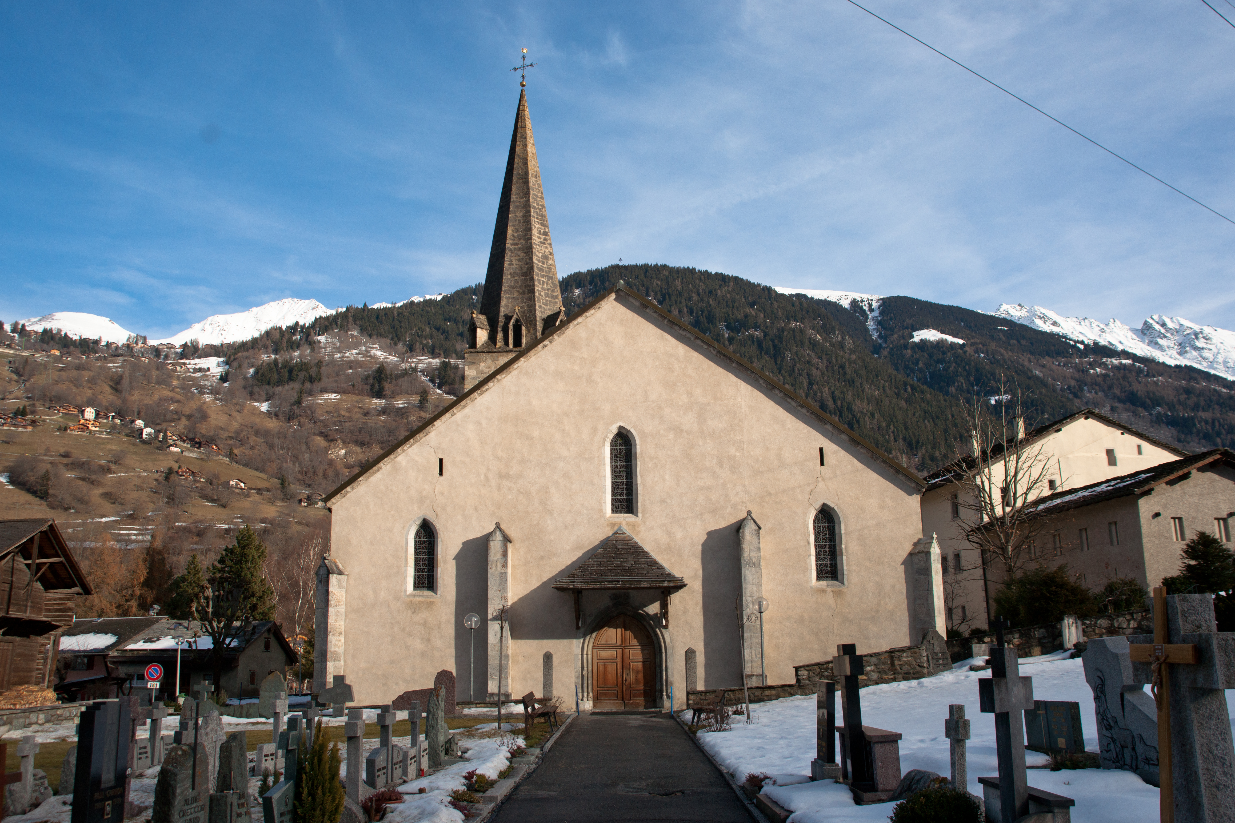 Église St-Maurice, Le Châble. Commune de Bagnes dans le val de Bagnes. Canton du Valais, Suisse. L'église est inscrit à l'inventaire suisse des biens culturels d'importance nationale.